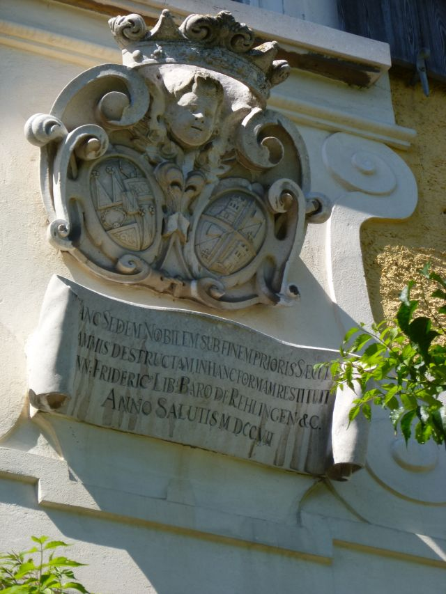 Schloss Ursprung_Wappen